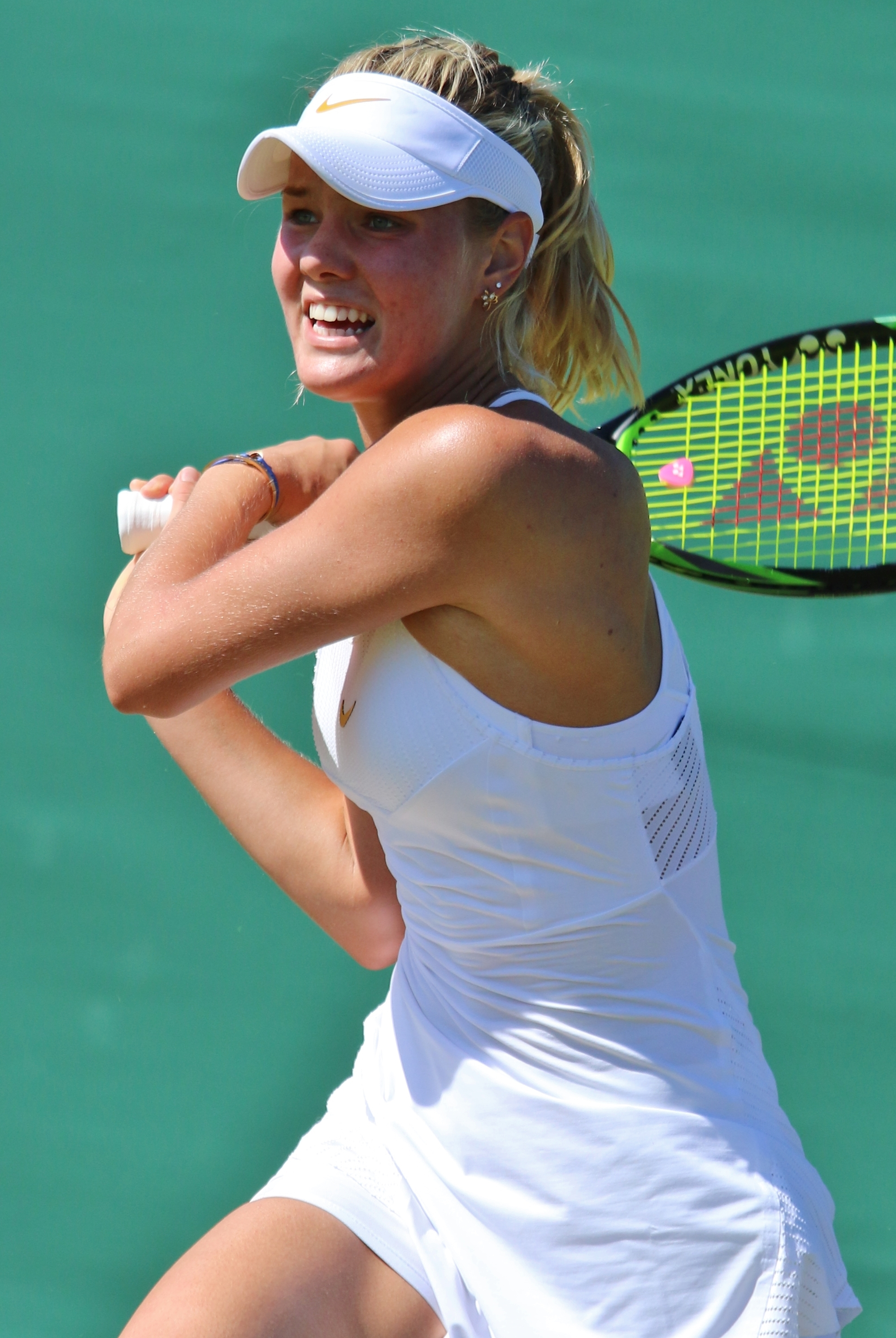 Zhuk WMQ18 (10)